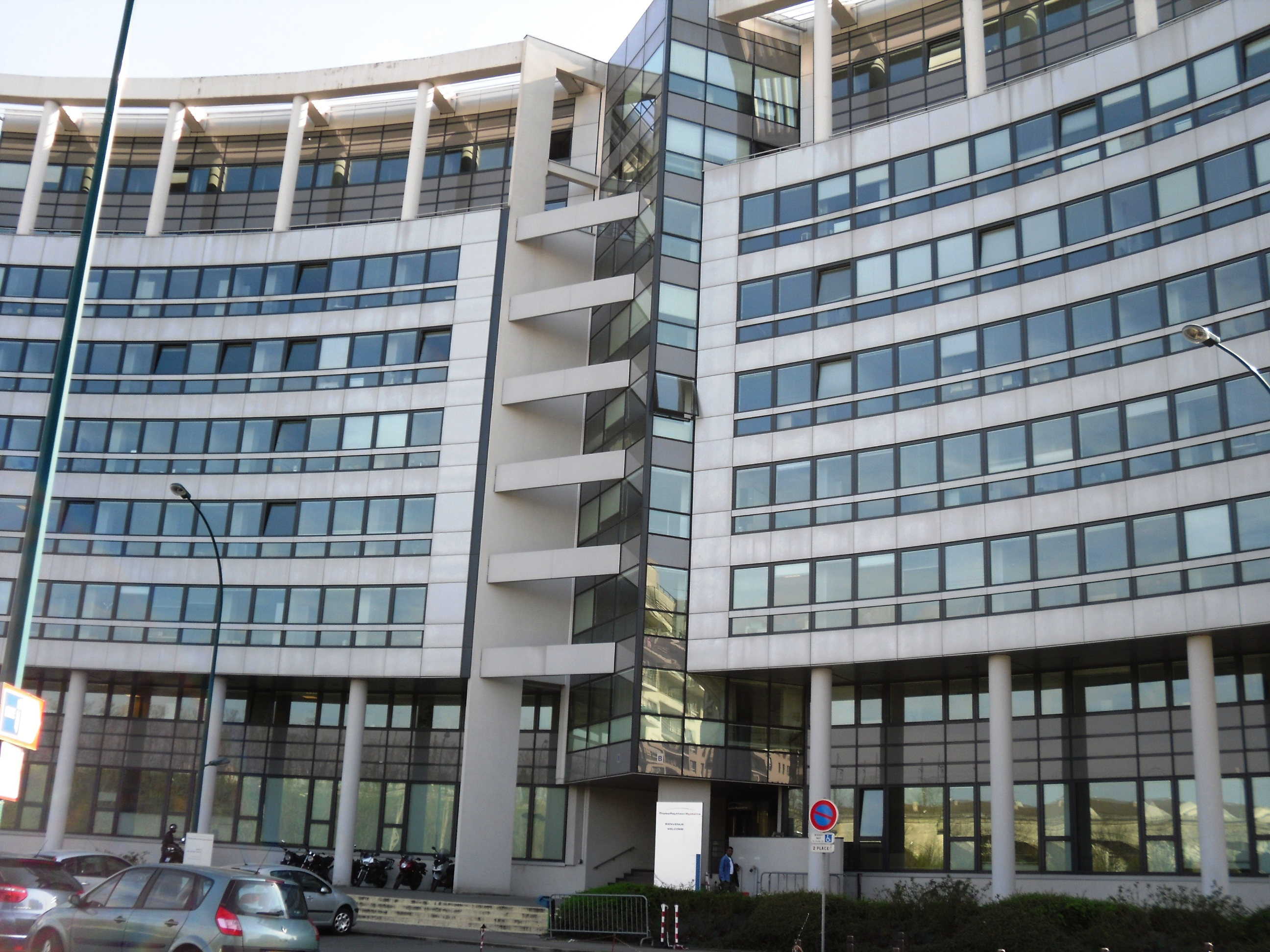 Le siège social de Thales Raytheon Systems à Massy (91)